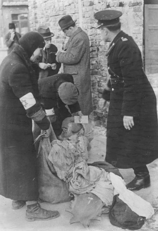 Polen, Ghetto Krakau, Polizeikontrolle Generalgouvernement. Juden hinter Mauern. Alle Kisten, Koffer und Säcke werden untersucht und damit jeder Schleichhandel unterbunden. PK-Koch-Scherl-Bilderdienst 5211-41 Mai 1941